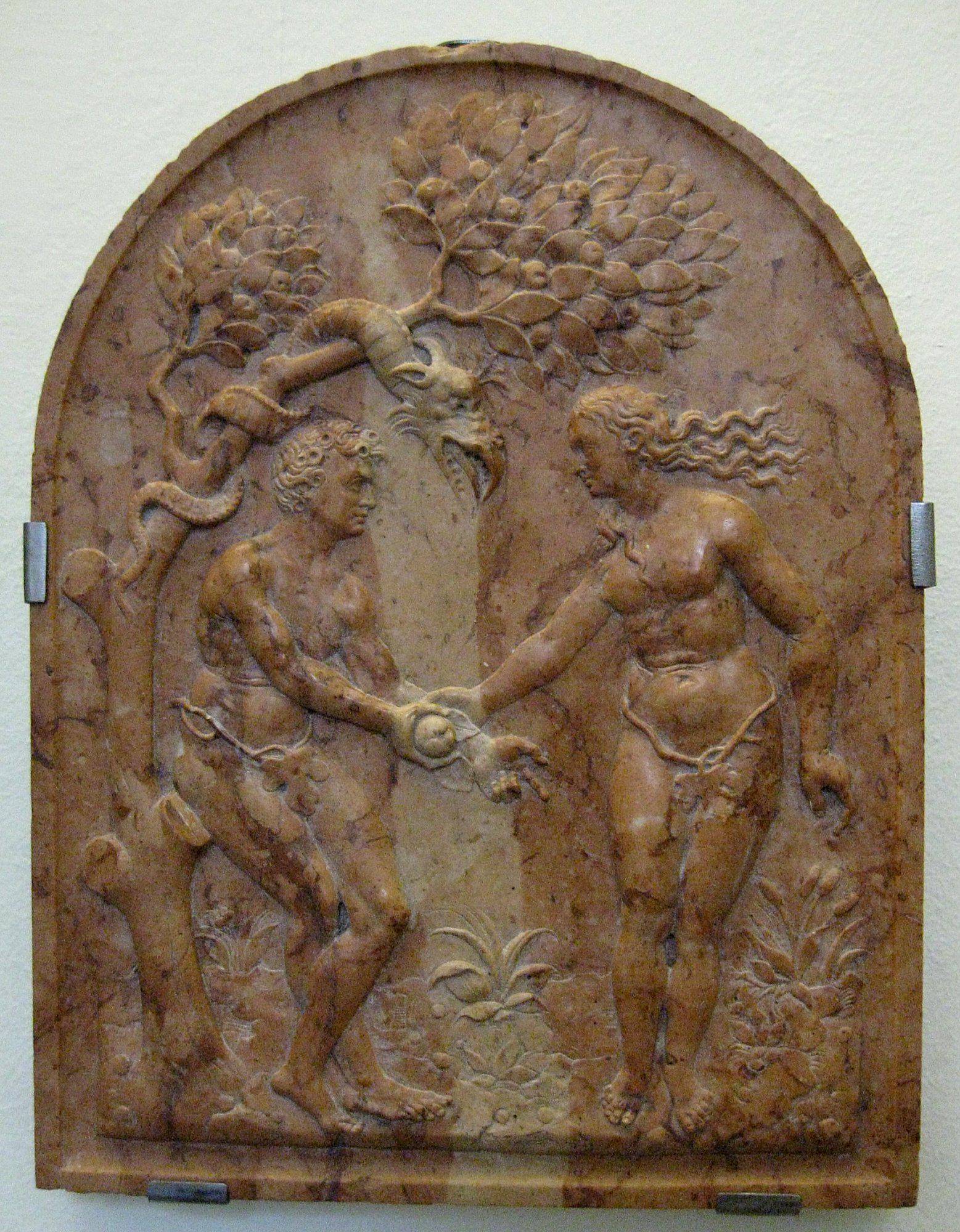 Ludwig Krug: Adam und Eva, um 1520/25, Rötlicher Marmor, Bayerisches Nationalmuseum in München